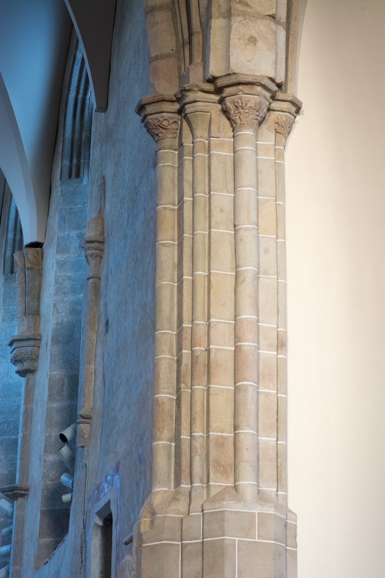 detail přípor jižního pilíře vítězného oblouku